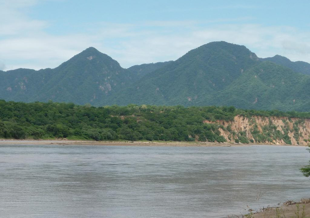 Valle del río Pilcomayo en Villamontes